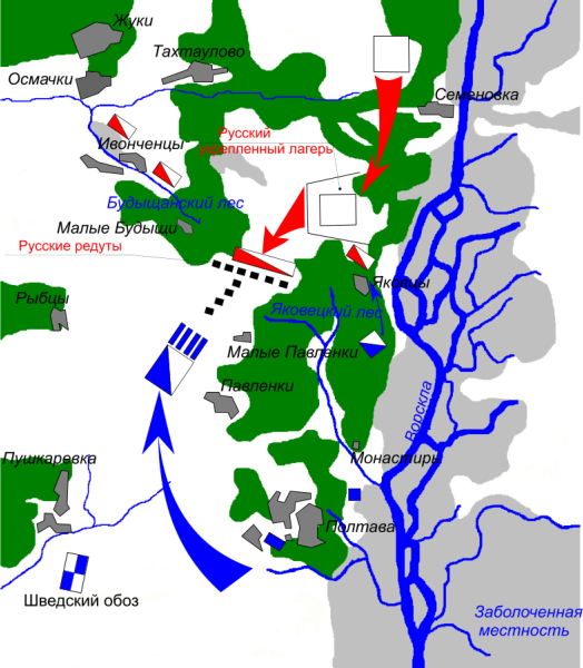 Начало Полтавской битвы